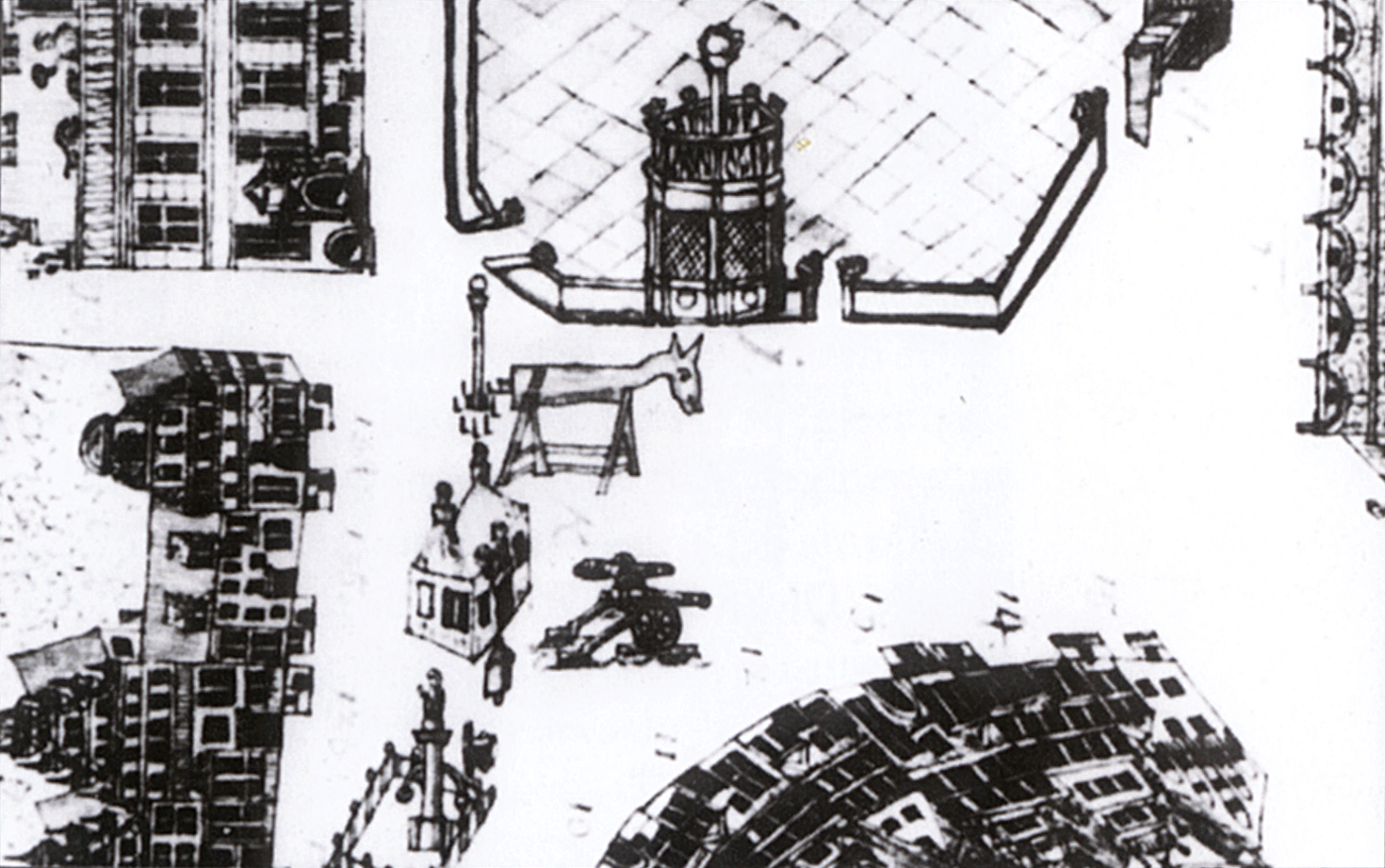 Der Schandesel auf dem Bremer Marktplatz, Zeichnung um 1730